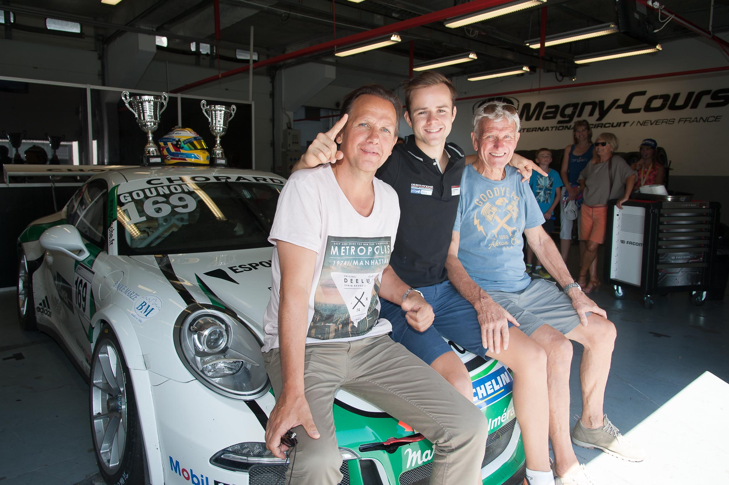 Photographie de la famille Gounon avec Jean-Marc, son fils Jules et son père Jean-Louis, tous trois pilotes automobiles, en 2015.